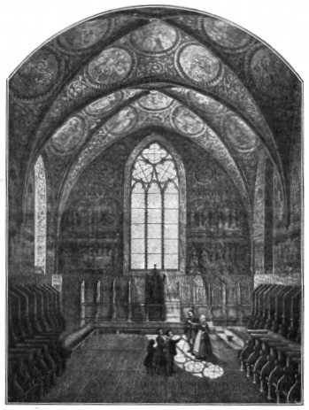 Ein Klostermuseum in der Heide. In: Die Denkmalpflege. 4 Jg., Berlin: Wilhelm Ernst & Sohn, 1902, S. 109–113.